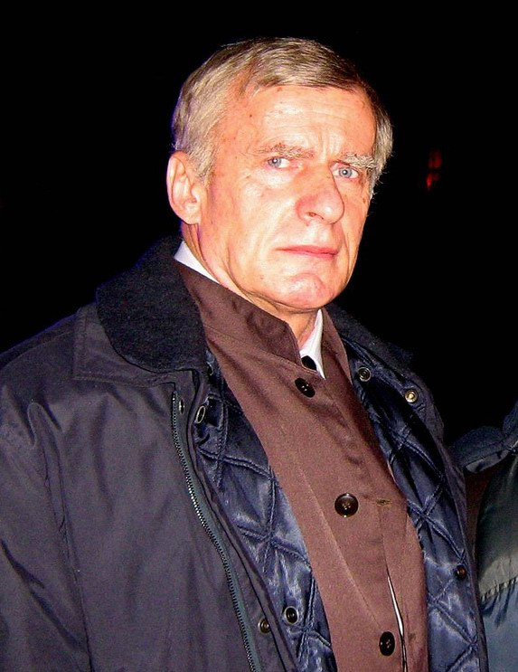 Marian Glinka (ur. 1 lipca 1943 w Warszawie) – polski aktor.